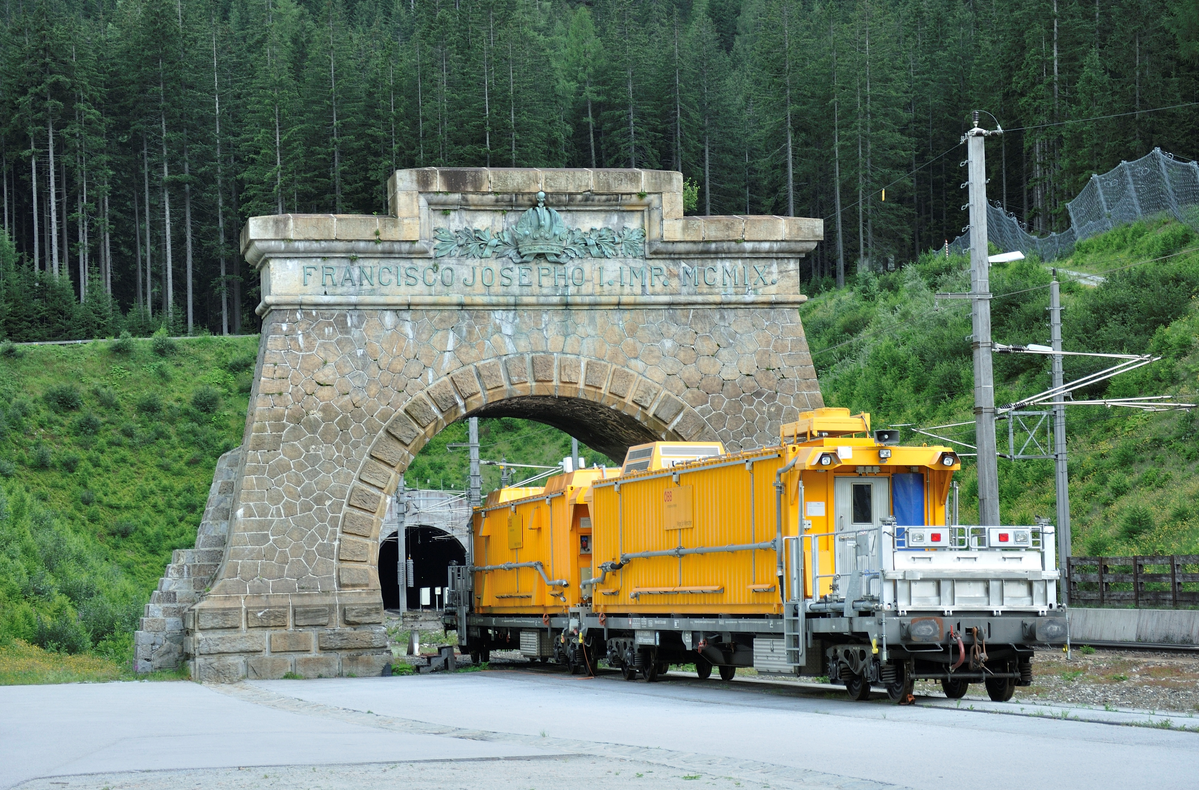 Tauerntunnel, Tunnelportal-Nord, Salzburger Seite